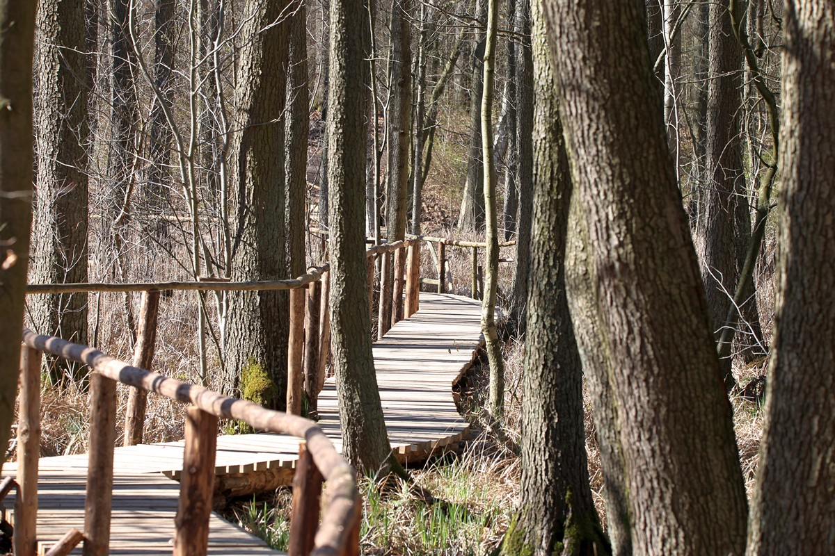 Sumpfsteg in Glienholz bei Röbel/Müritz